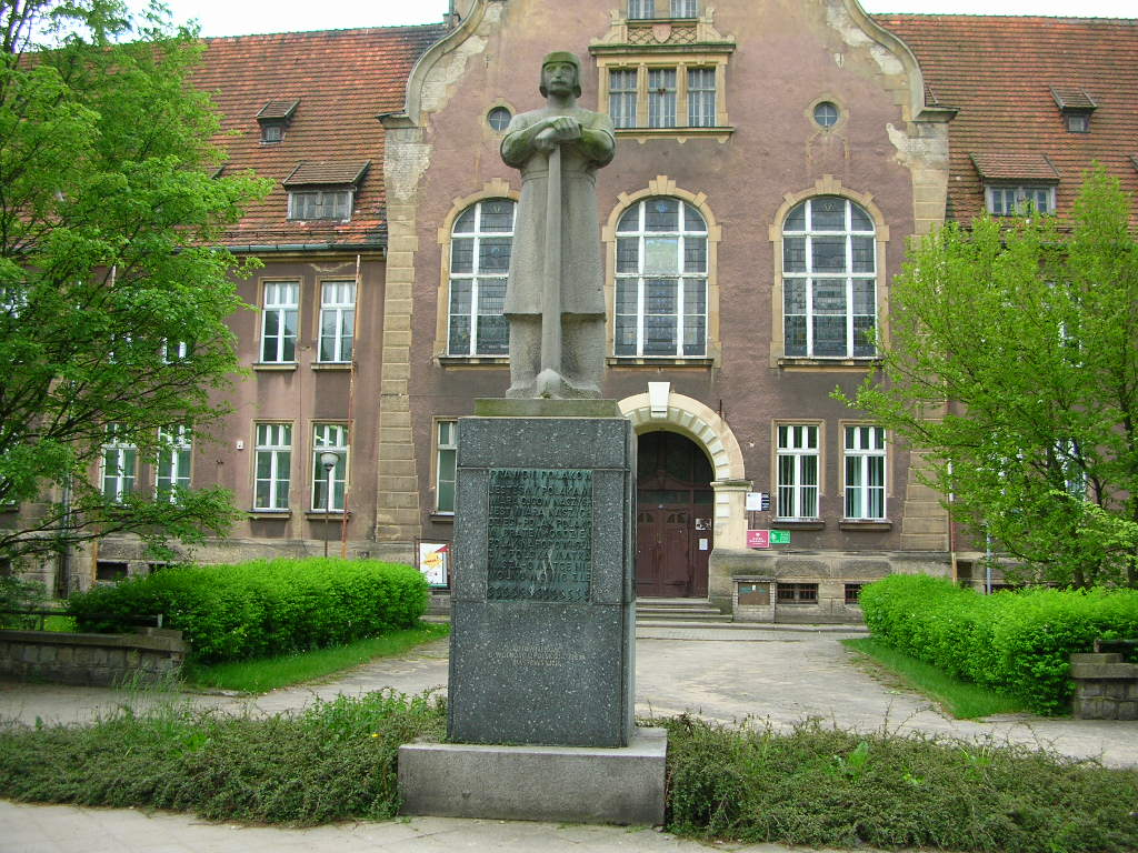 Złotów - Pomnik Piast Kołodzieja. Autor - Bartek Wawraszko (Bast)